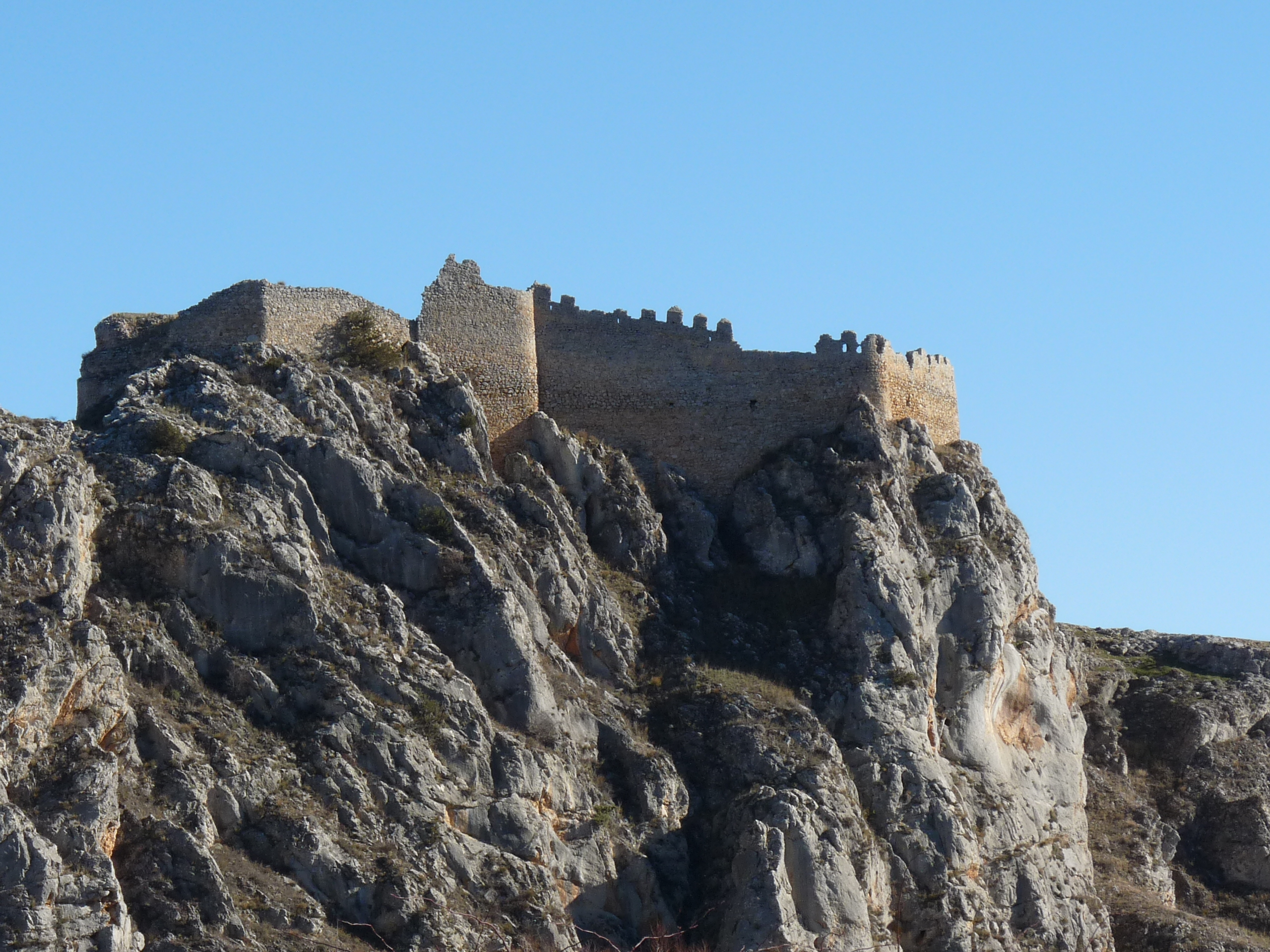 Ciria - Castillo s. X